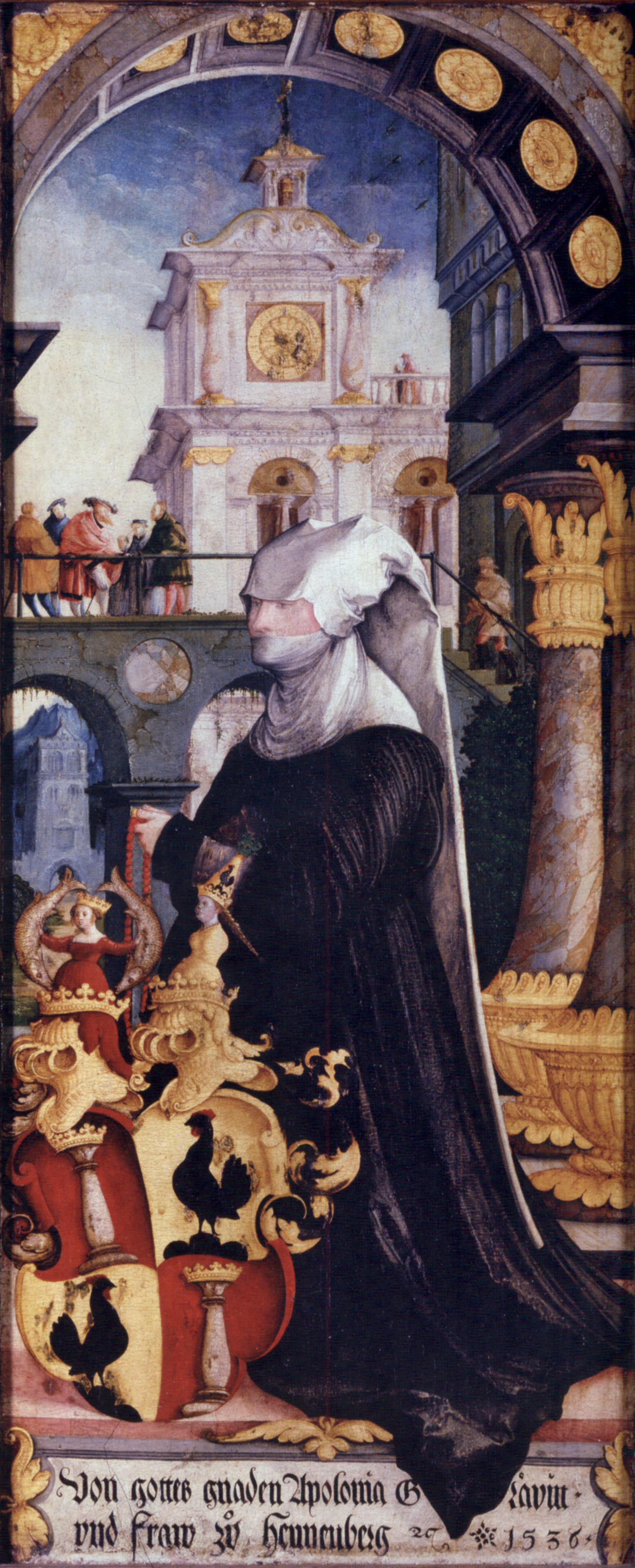 Wildensteiner Altar rechter Drehflügel innen, kniende Stifterin Gräfin Apollonia von Henneberg mit Wappen Staatsgalerie Stuttgart, Inv. L 1380 (früher Donaueschingen, Fürstenbergsammlungen, Inv.Nr. 76-80)